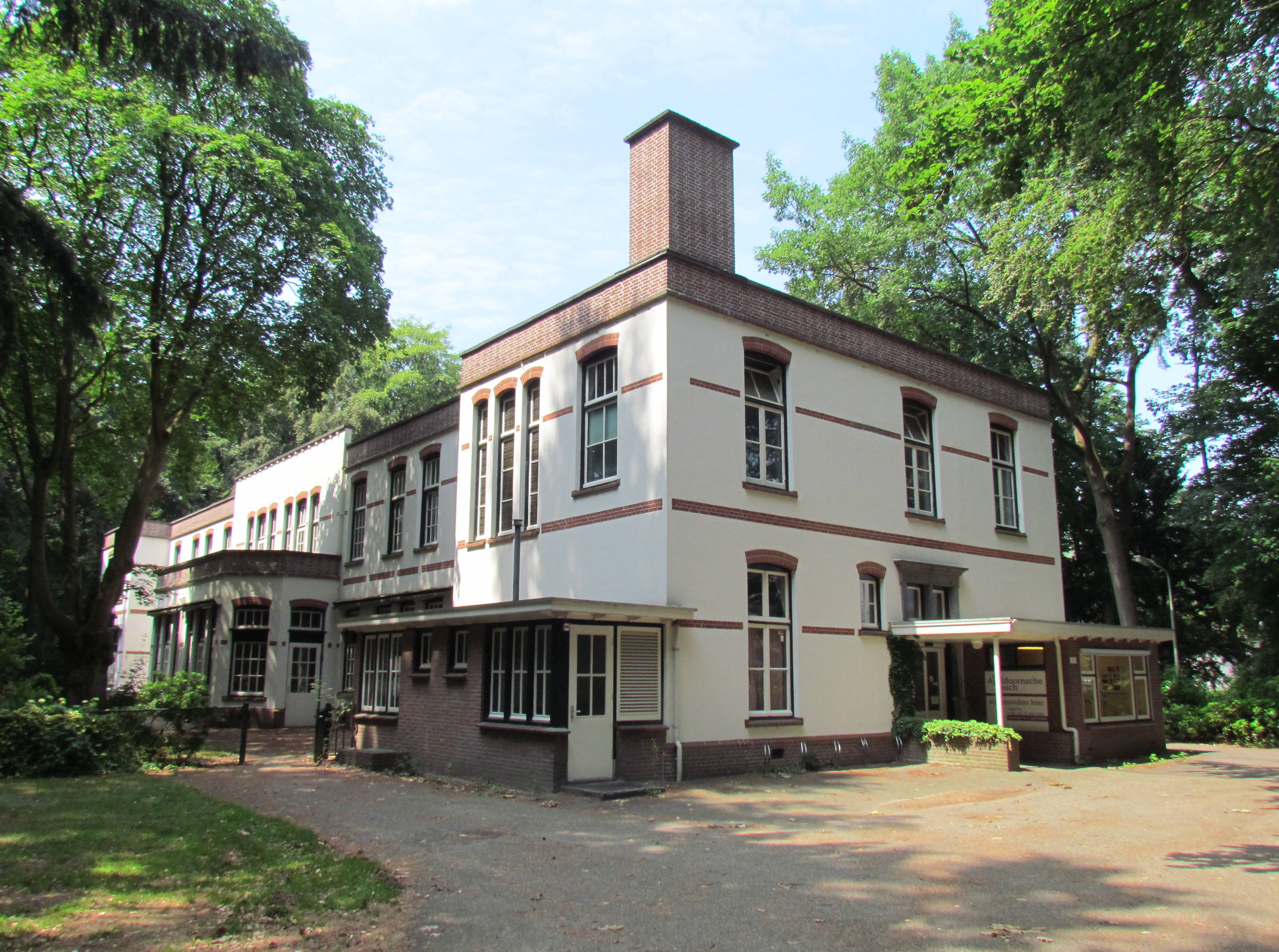 Het Apeldoornsche Bosch, herstellingsoord 'Hannah'/'Channah' (later 'Berk')